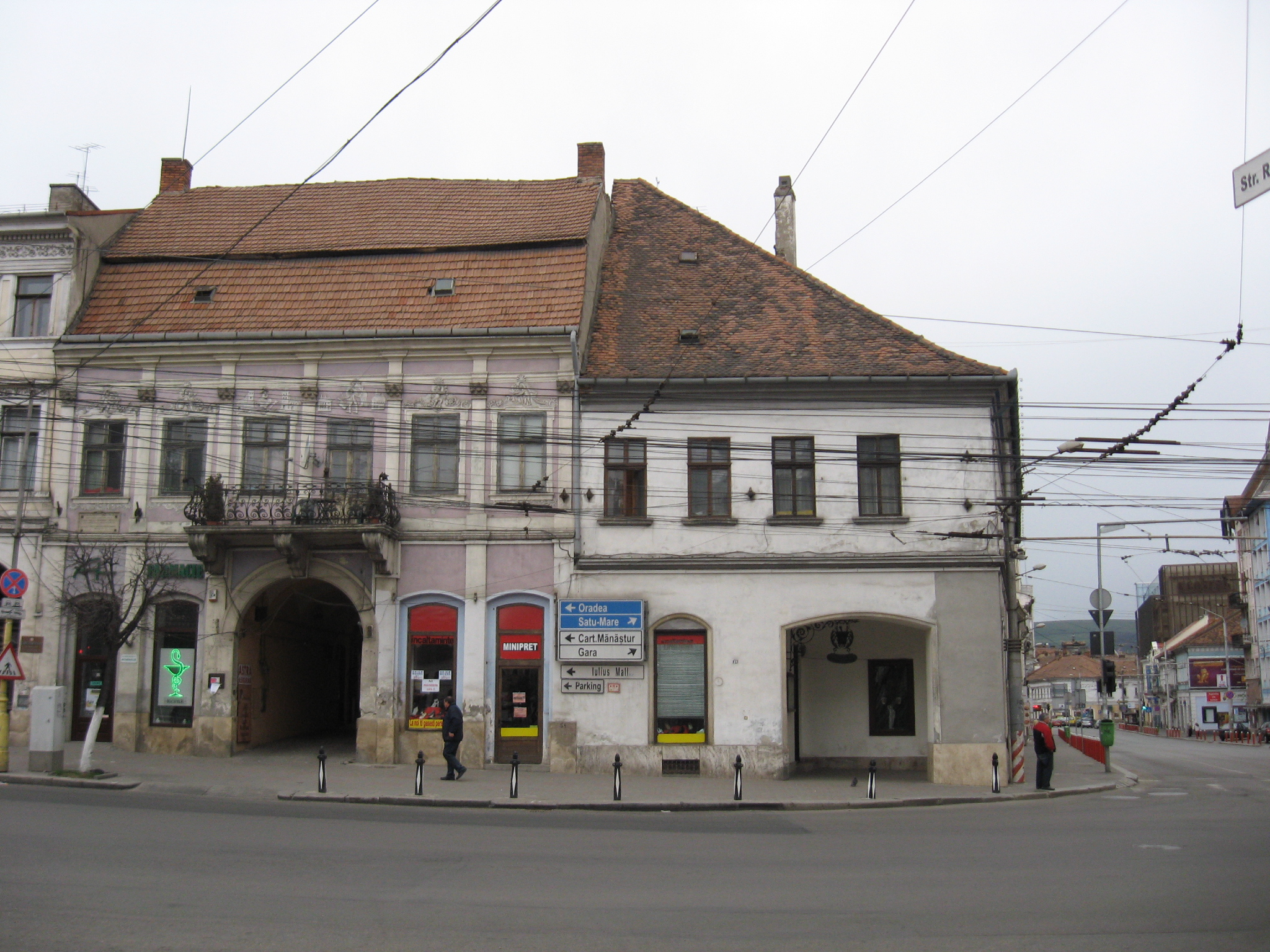 Cluj-Napoca, Muzeul Farmaciei, Casa Mauksch-Hintz, Piața Unirii nr. 28 (colț cu str. Regele Ferdinand)